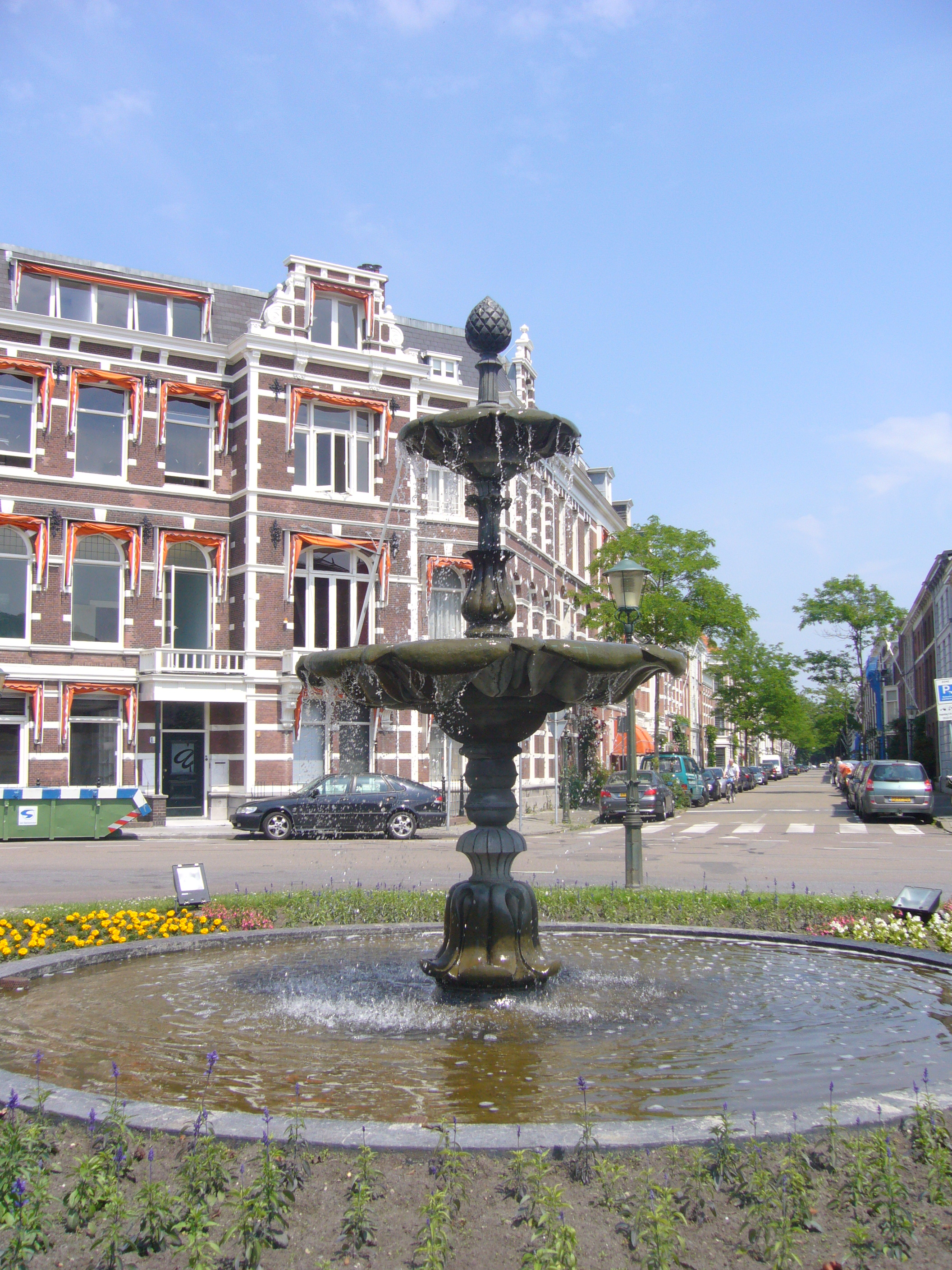 Bankaplein, Den Haag. A design by architect H. van der Leeden and Renske Morks in 1988